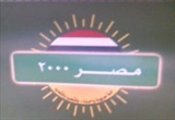 شعار حزب مصر 2000